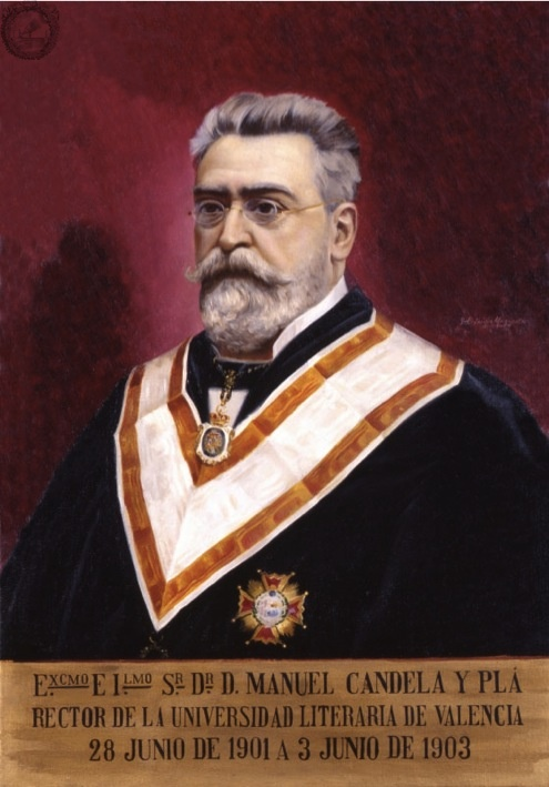 Retrato del ginecólogo y catedrático español Manuel Candela (1847-1919), que fue rector de la Universidad de Valencia.